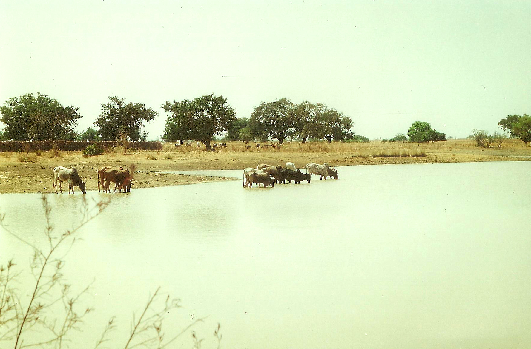 lake in dourtenga, burkina faso